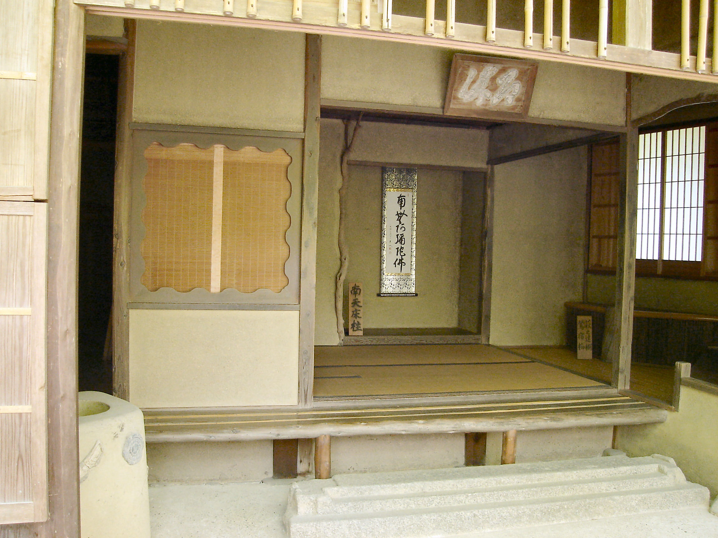 Rokuonji Sekkatei (夕佳亭)